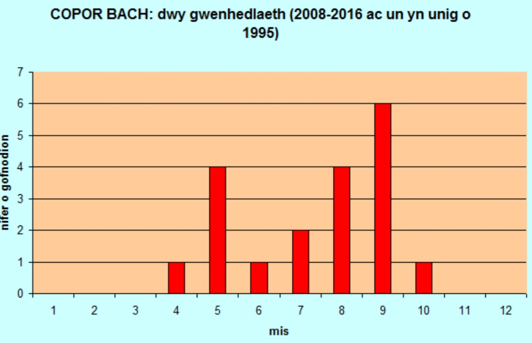 Graff yn dangos amseriad y ddwy genedlaeth o glöyn byw y Copor Bach (anterth mis Mai a mis Medi)